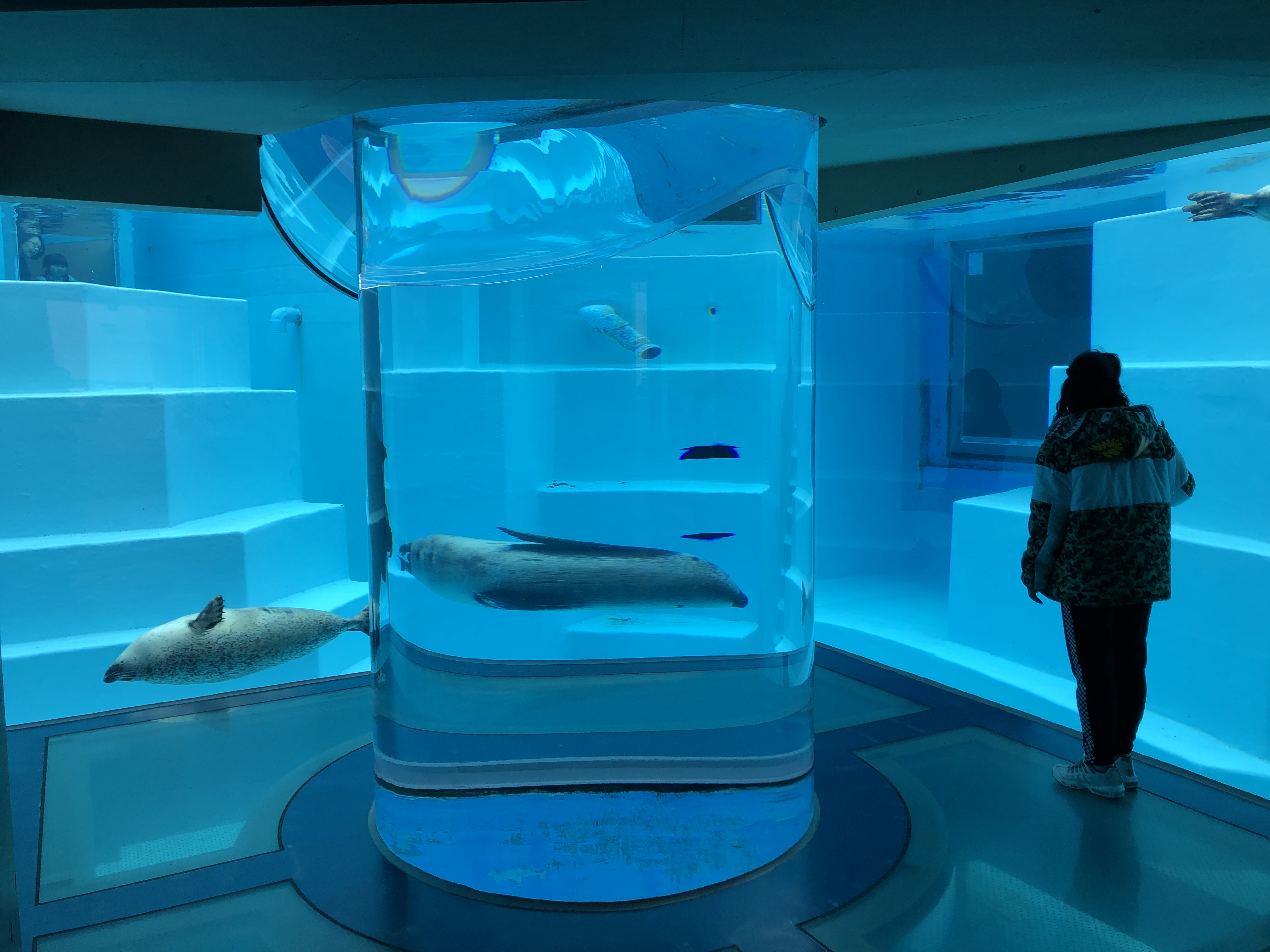 マリンワールド海の中道のうみなかCUBE